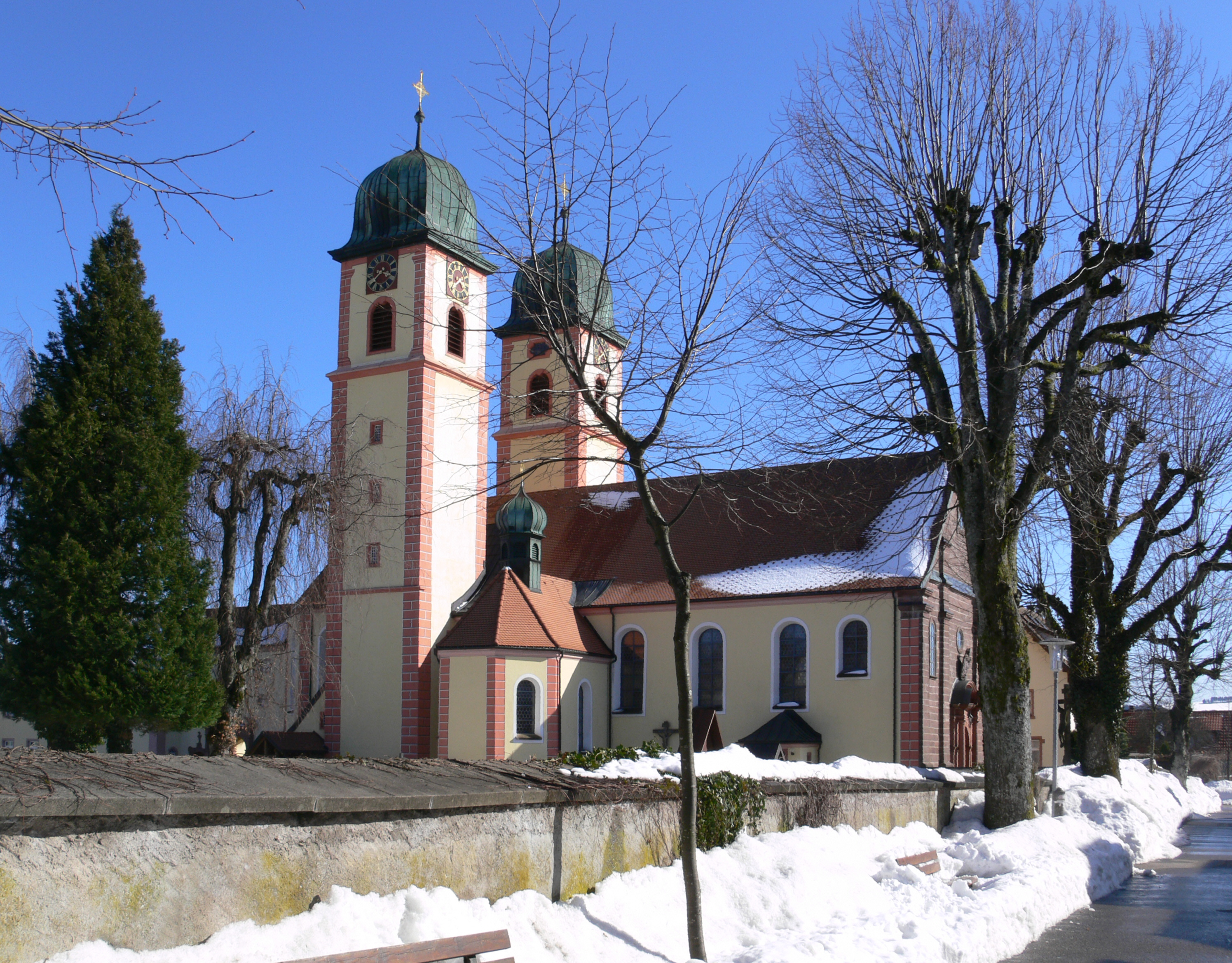 Ehemalige Klosterkirche (heute Katholische Pfarr- und Wallfahrtskirche) Mariä Himmelfahrt, St. Märgen im Schwarzwald